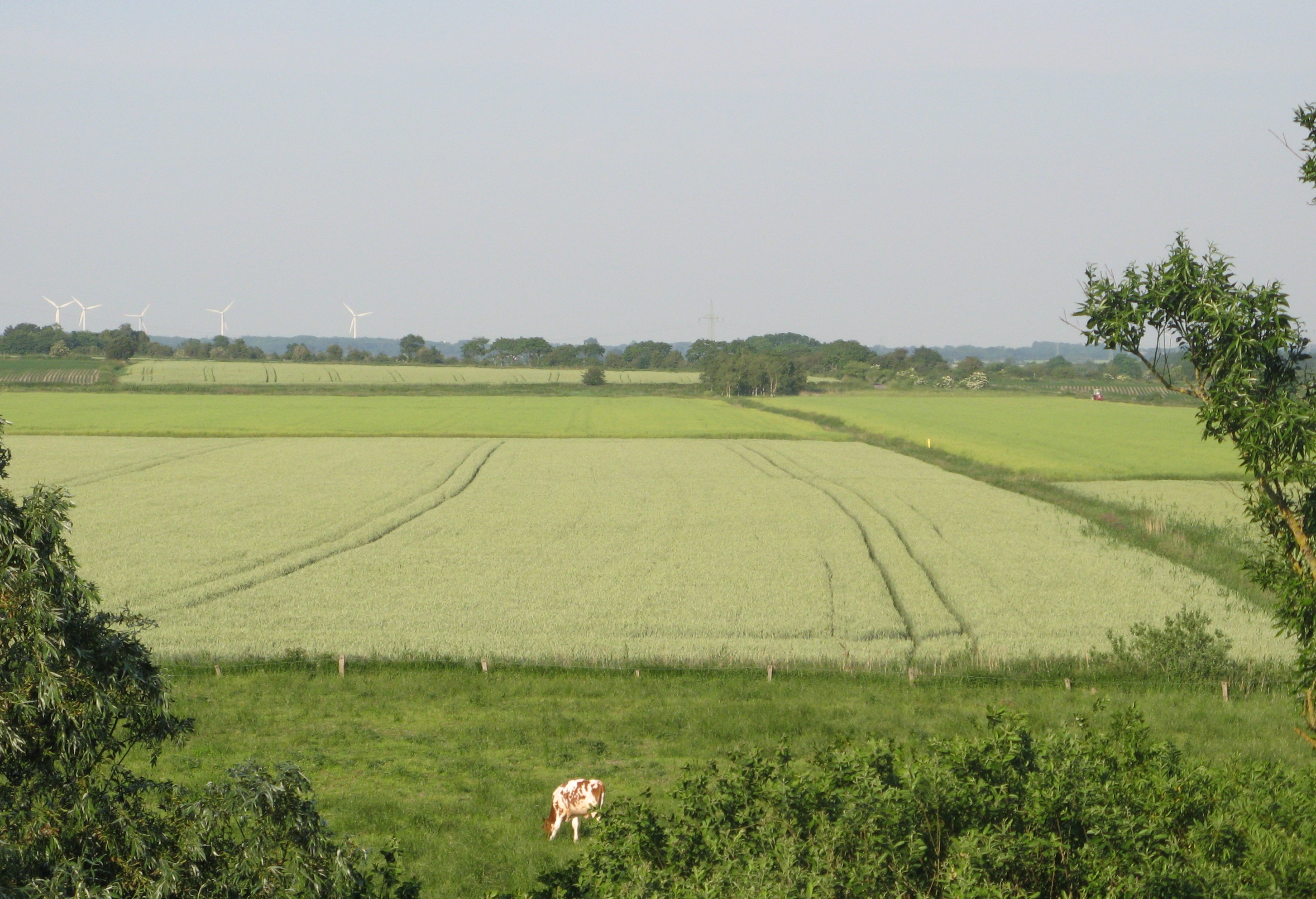 Vanells Vanellus in Schülp